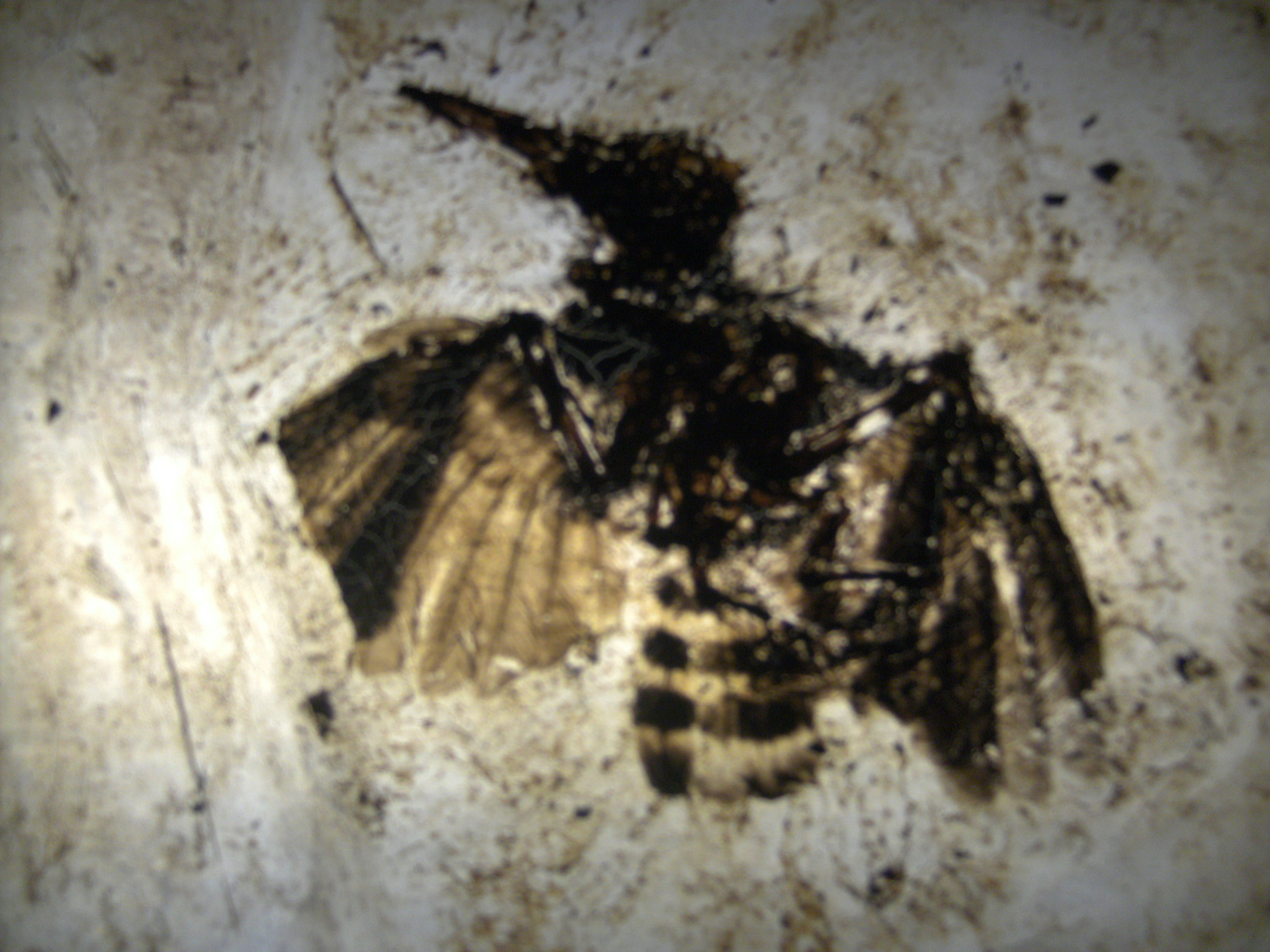 MESSELIRRISOR estas fosilia upupo-simila birdo el Messel.